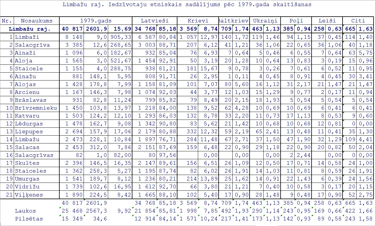 Latvijas 1979. gada tautas skaitīšanas dati